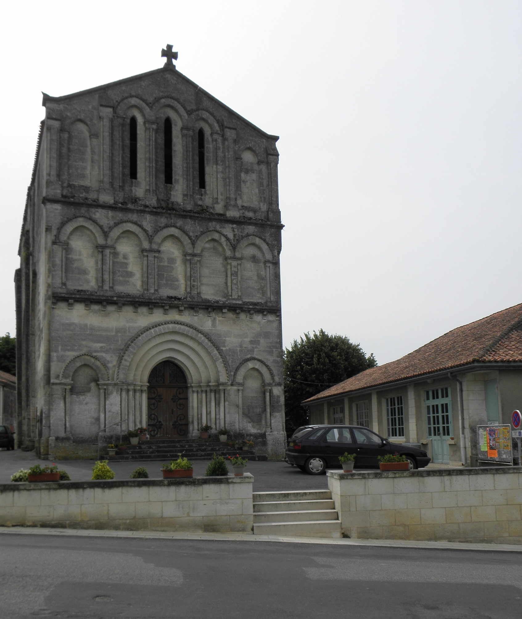 Église Saint-Maurice de Léguillac-de-Cercles (24). Façade occidentale.